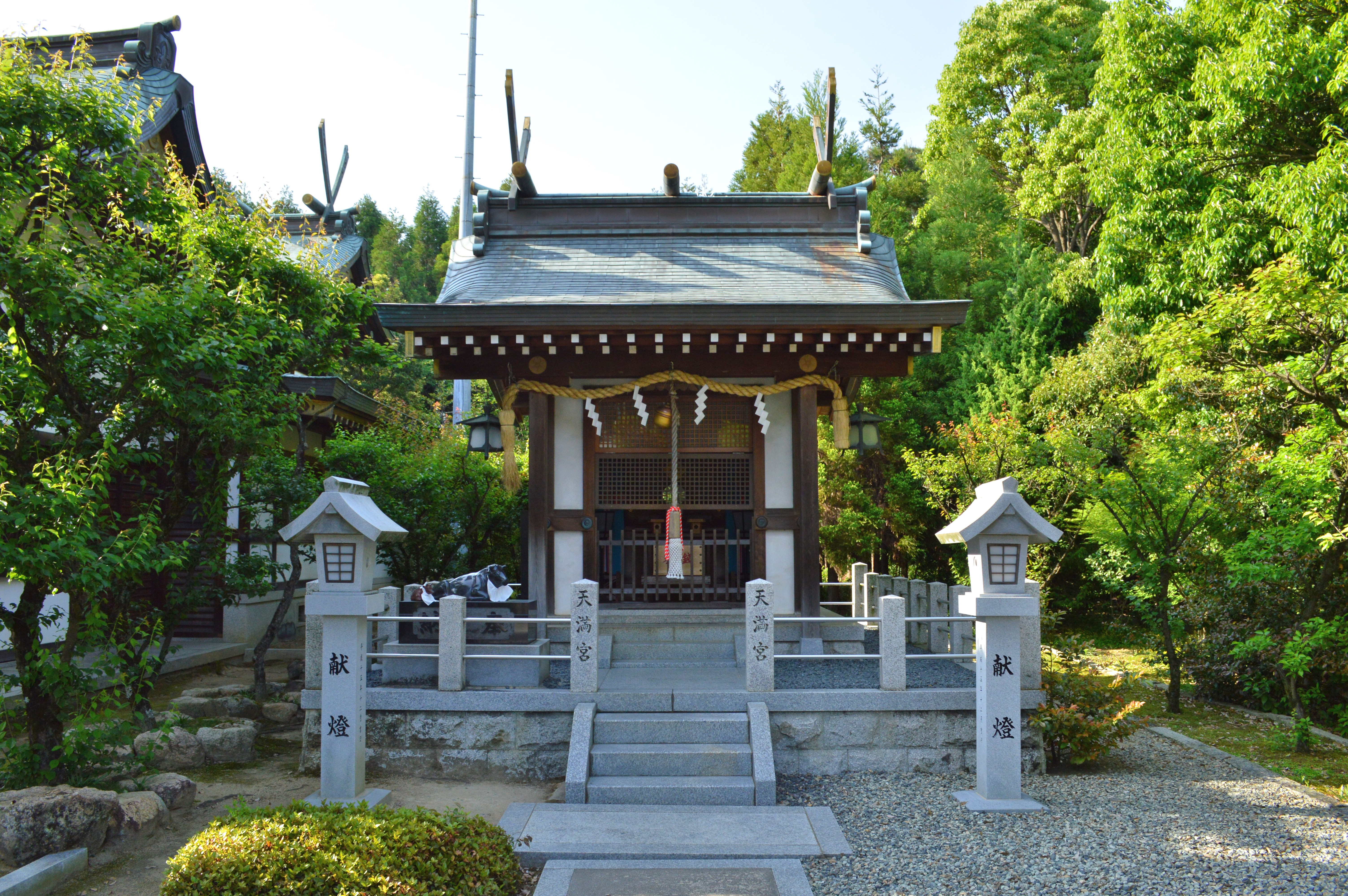 為那都比古神社 境内天満宮